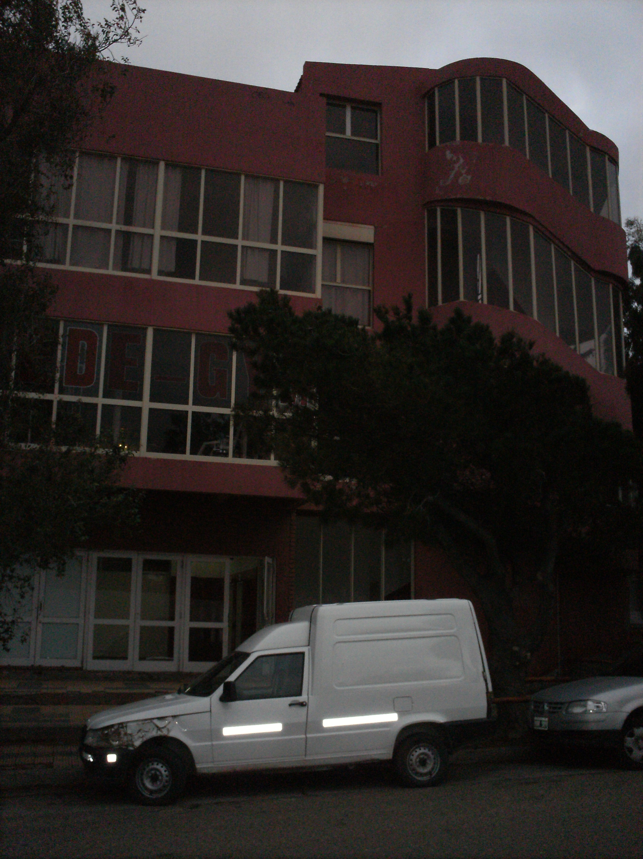 El edificio de la federacion